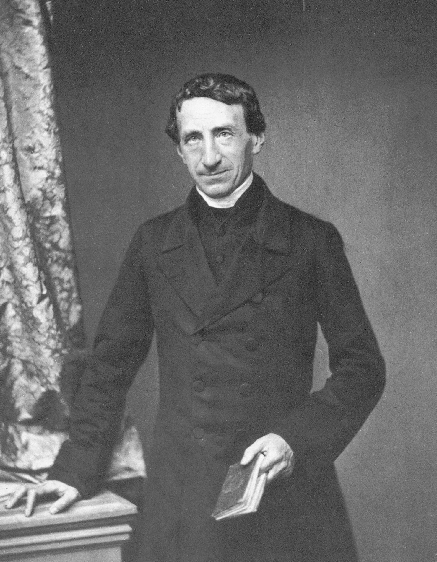 Ignaz von Döllinger (1799-1890)